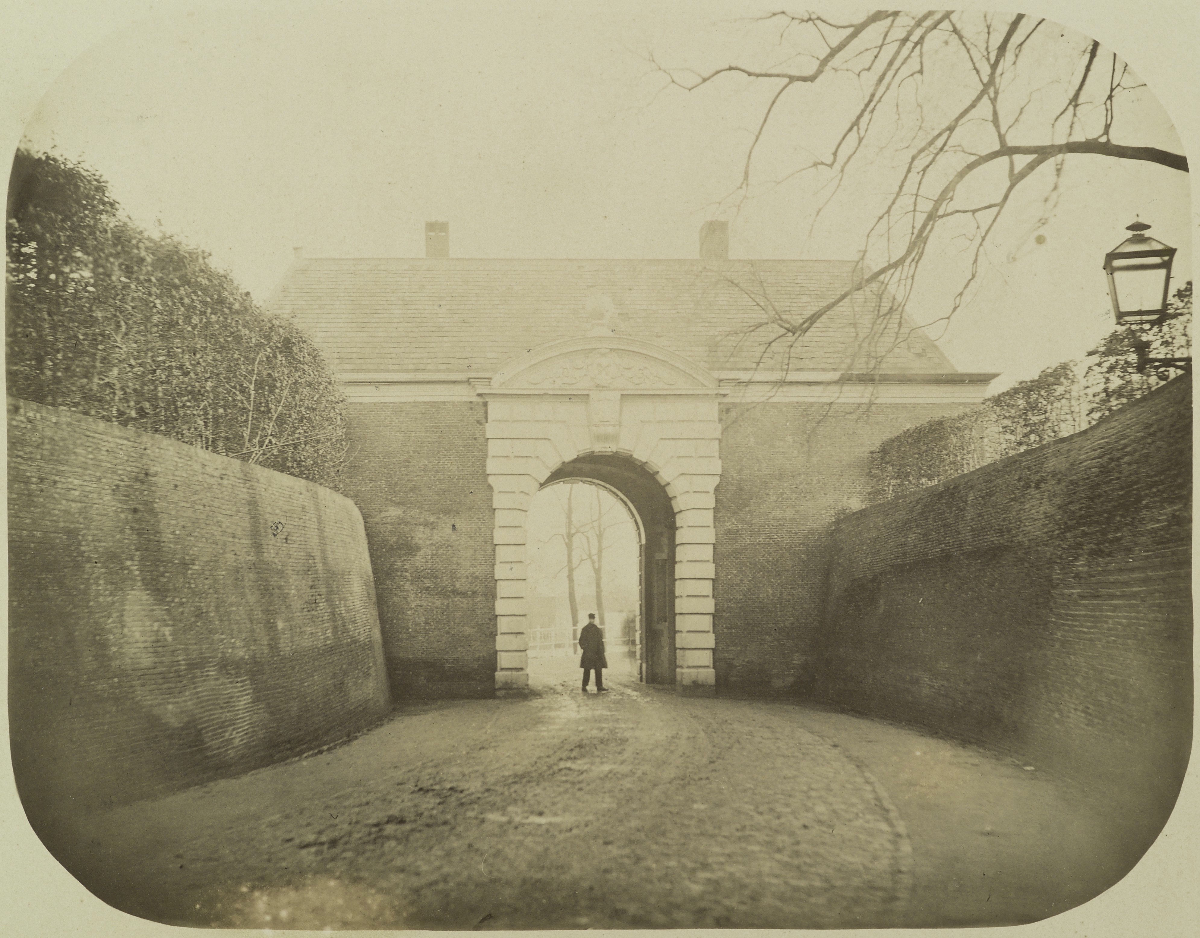 Hoogewoerdspoort: Stadspoort binnenzijde (opmerking: Op achterzijde plakker: Photographie van I. [?] Goedeljee, Papengr. hoek Langebrug, Leiden.)